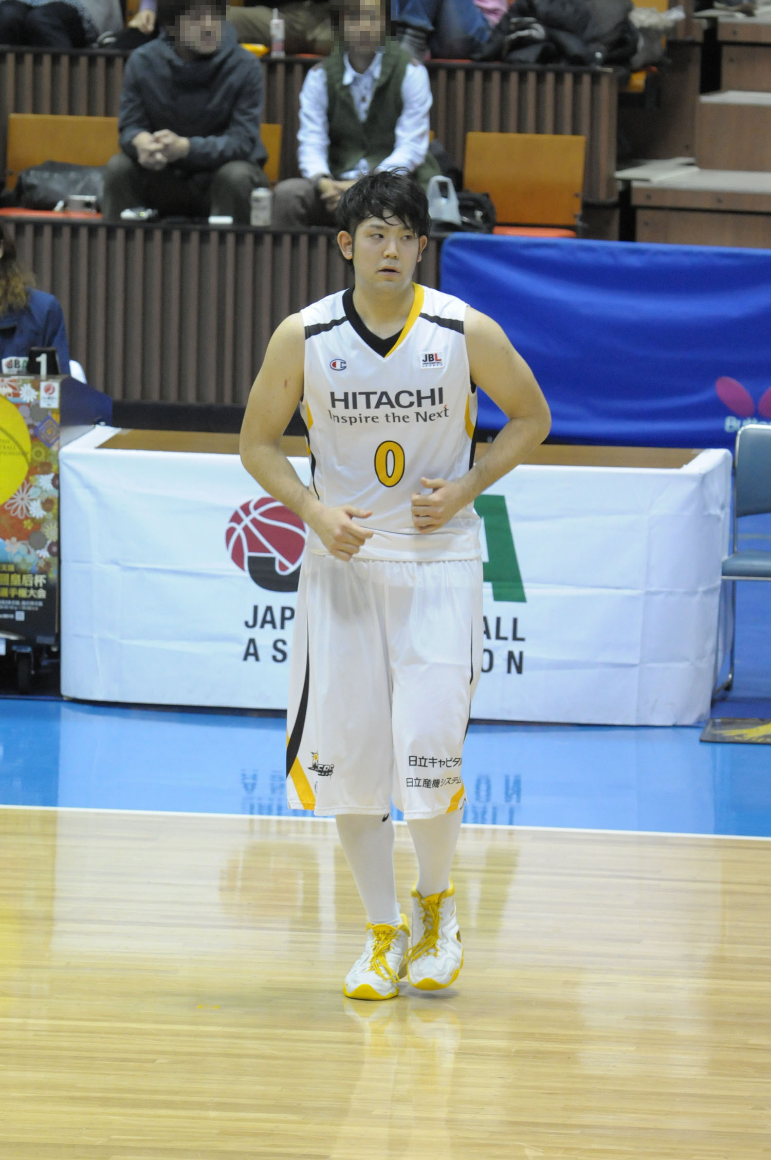 日立サンロッカーズ、満原優樹選手。代々木第二体育館で。